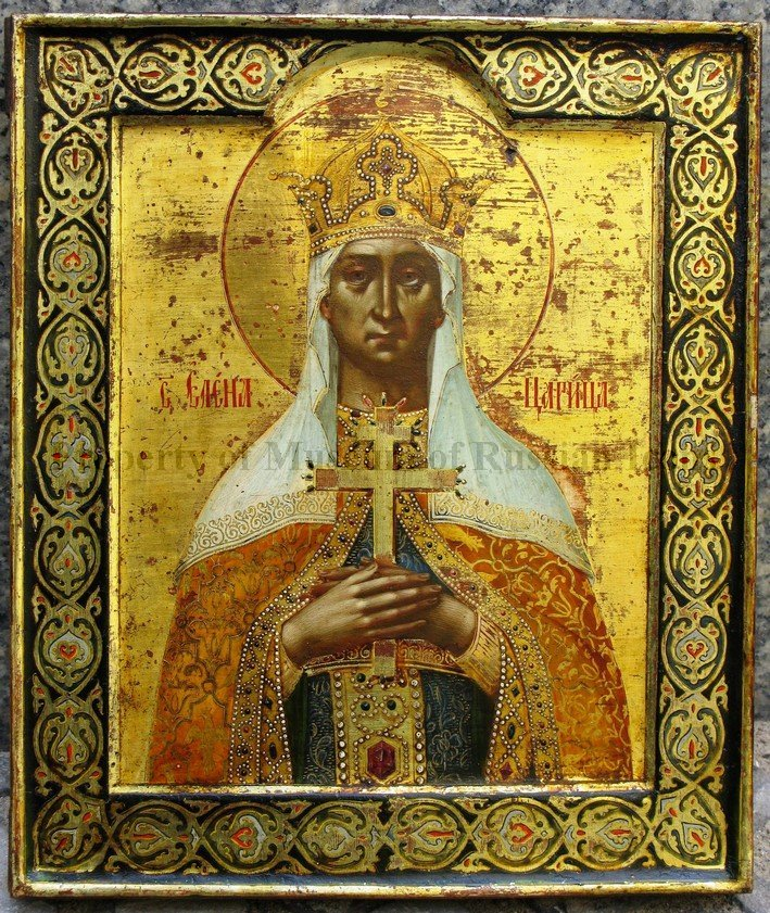 Helen